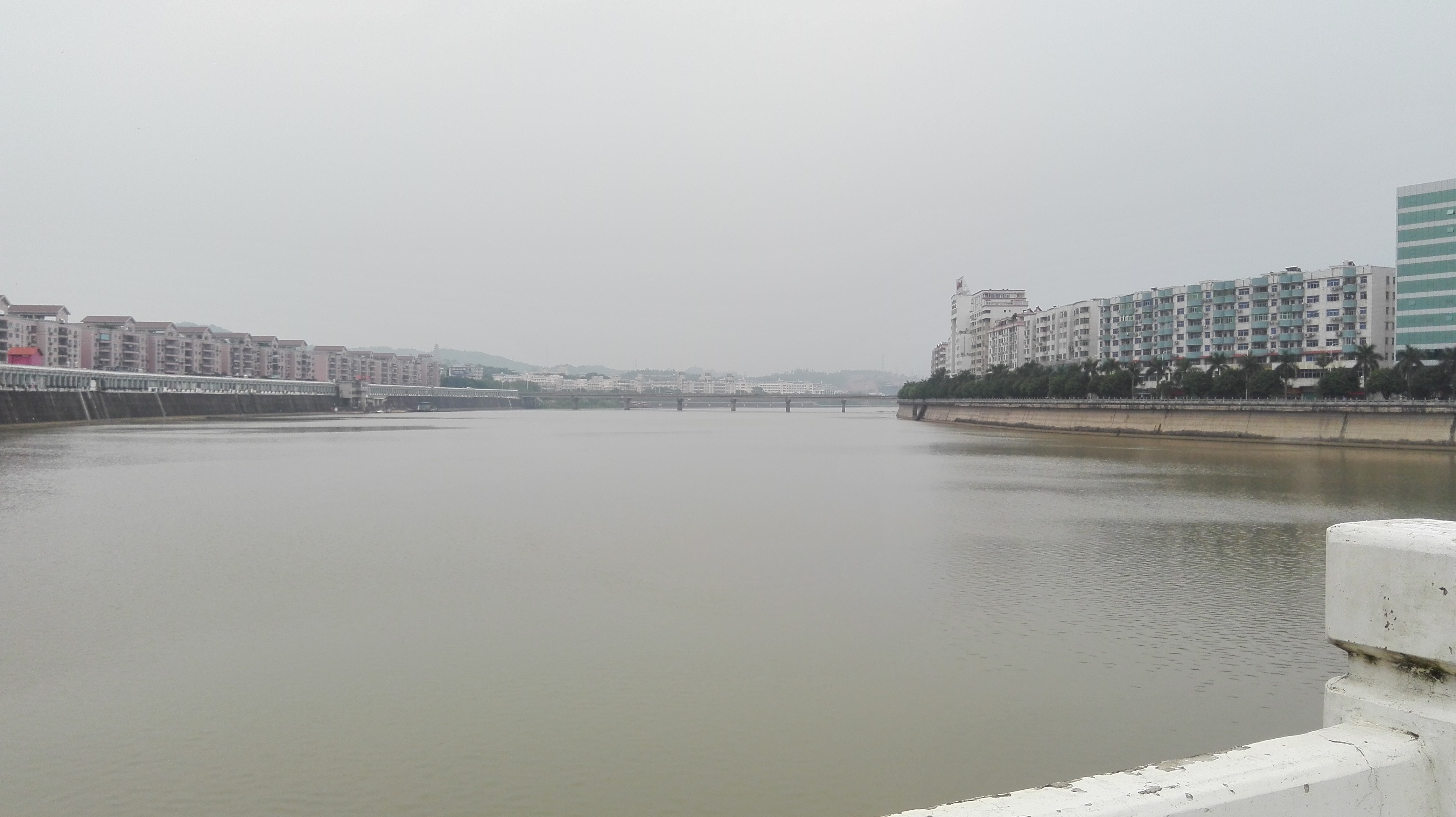 梅州市梅江桥上拍到的景象